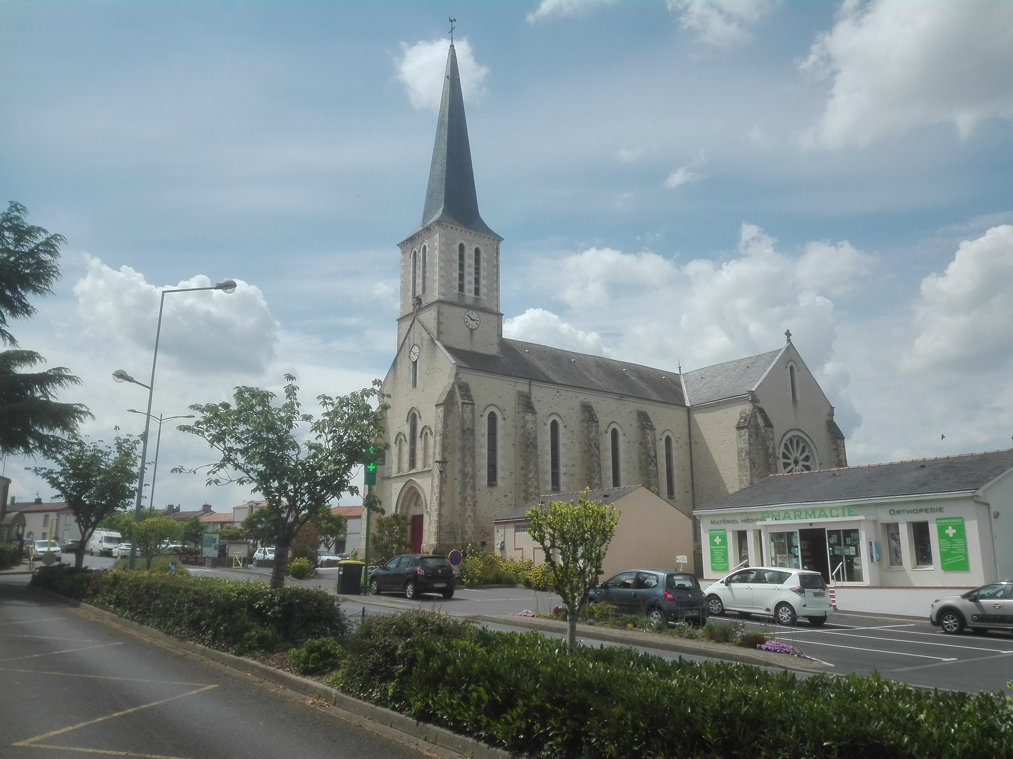 L'église de Saint Christophe du Bois